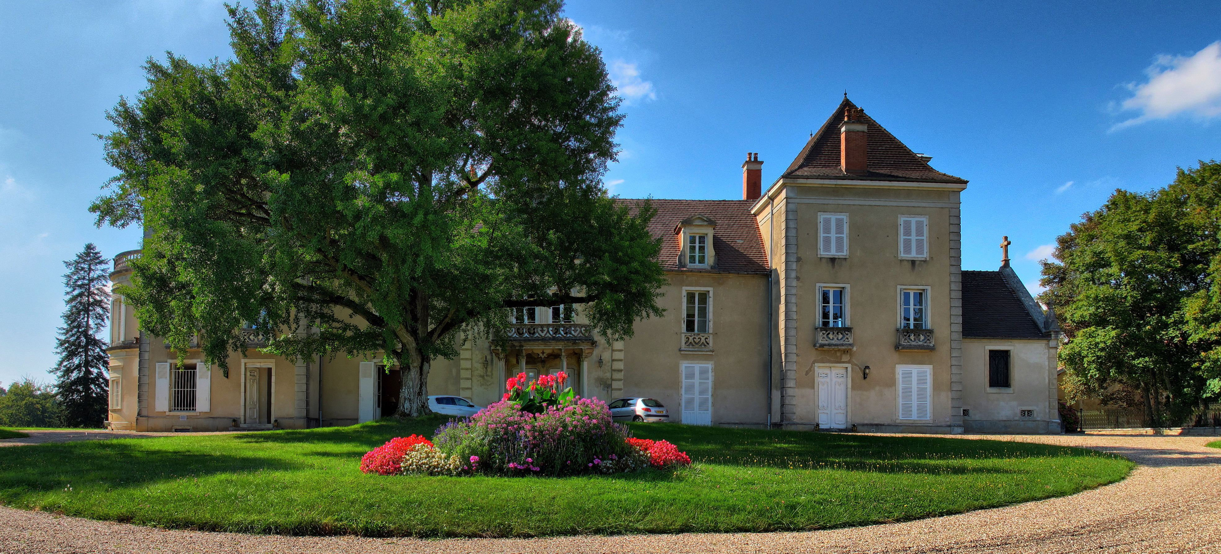 Le château de La Grande-Résie